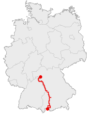 Course Map of Deutsche Romantische Straße